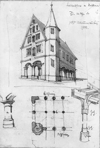 Heilbronn, Fleischhaus, Zeichnung von Conrad von Dollinger